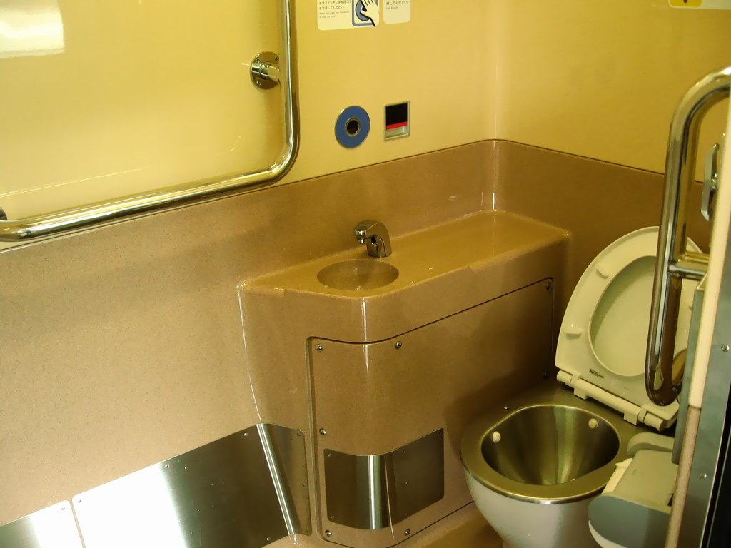 JR西日本521系電車の米原（近江今津）方先頭車に設置されているトイレ。 special rapid(ja/en) 12:14, 15 June 2007 (UTC)